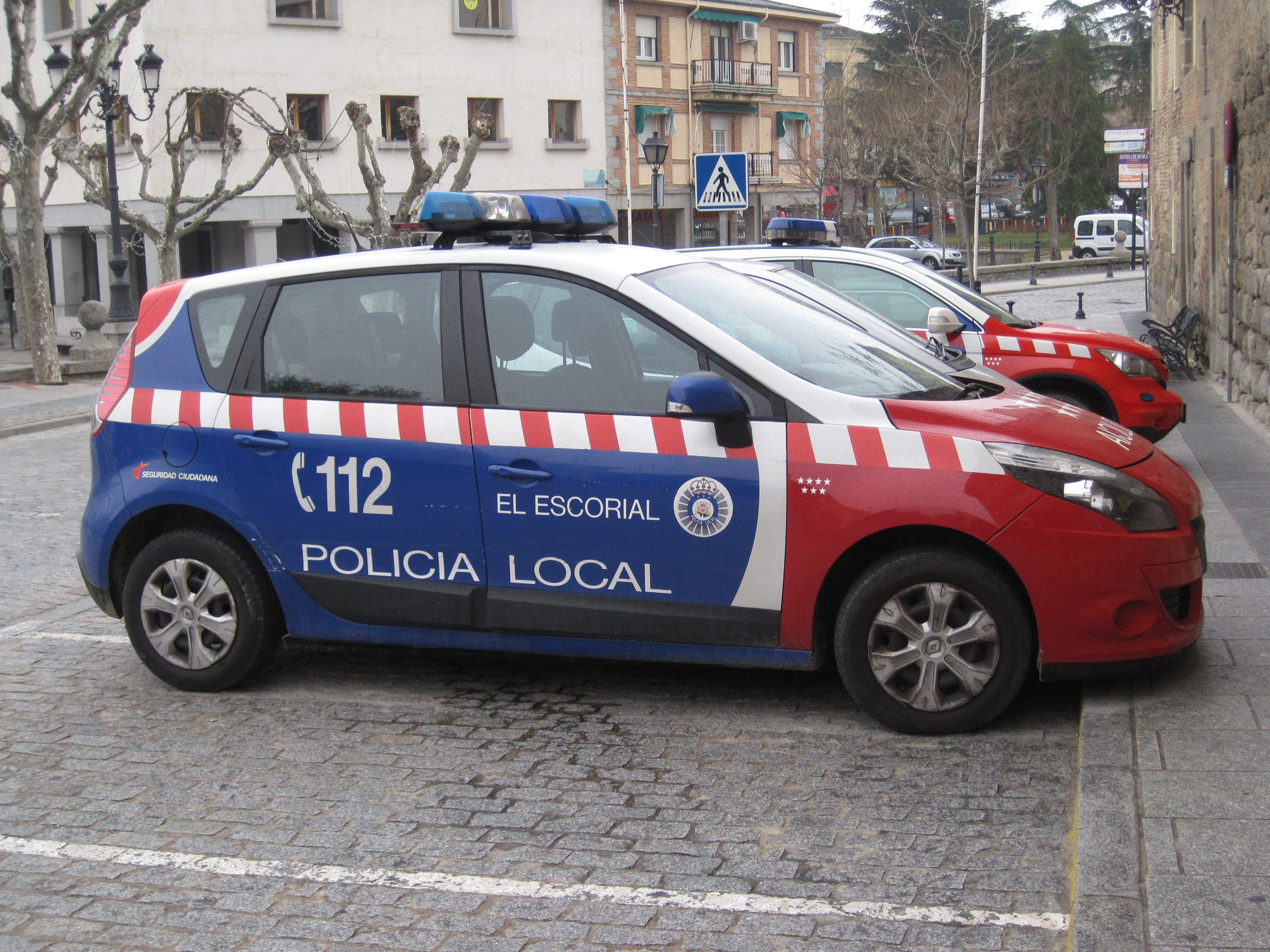 Vehículo de la policía local de El Escorial (Madrid, España).